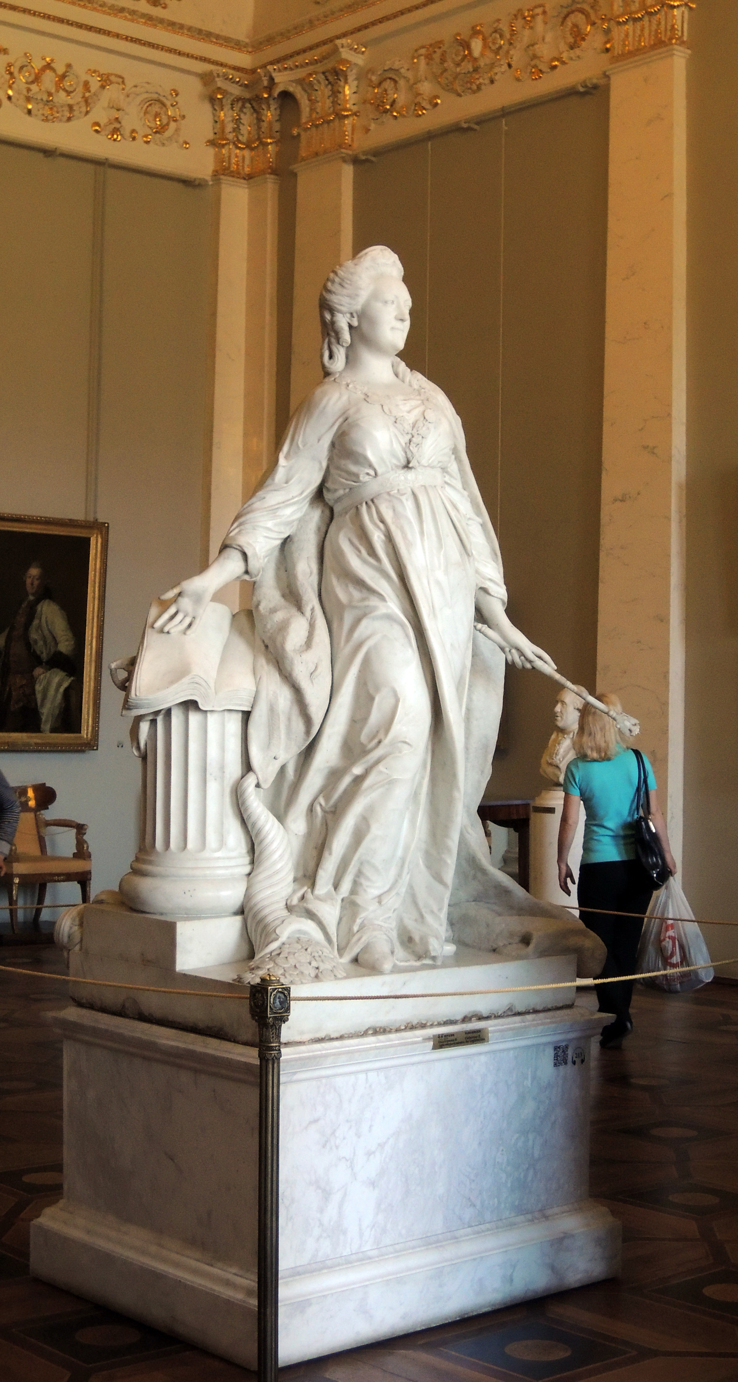 Ф. Шубин. «Екатерина II — законодательница», 1790, ГРМ.